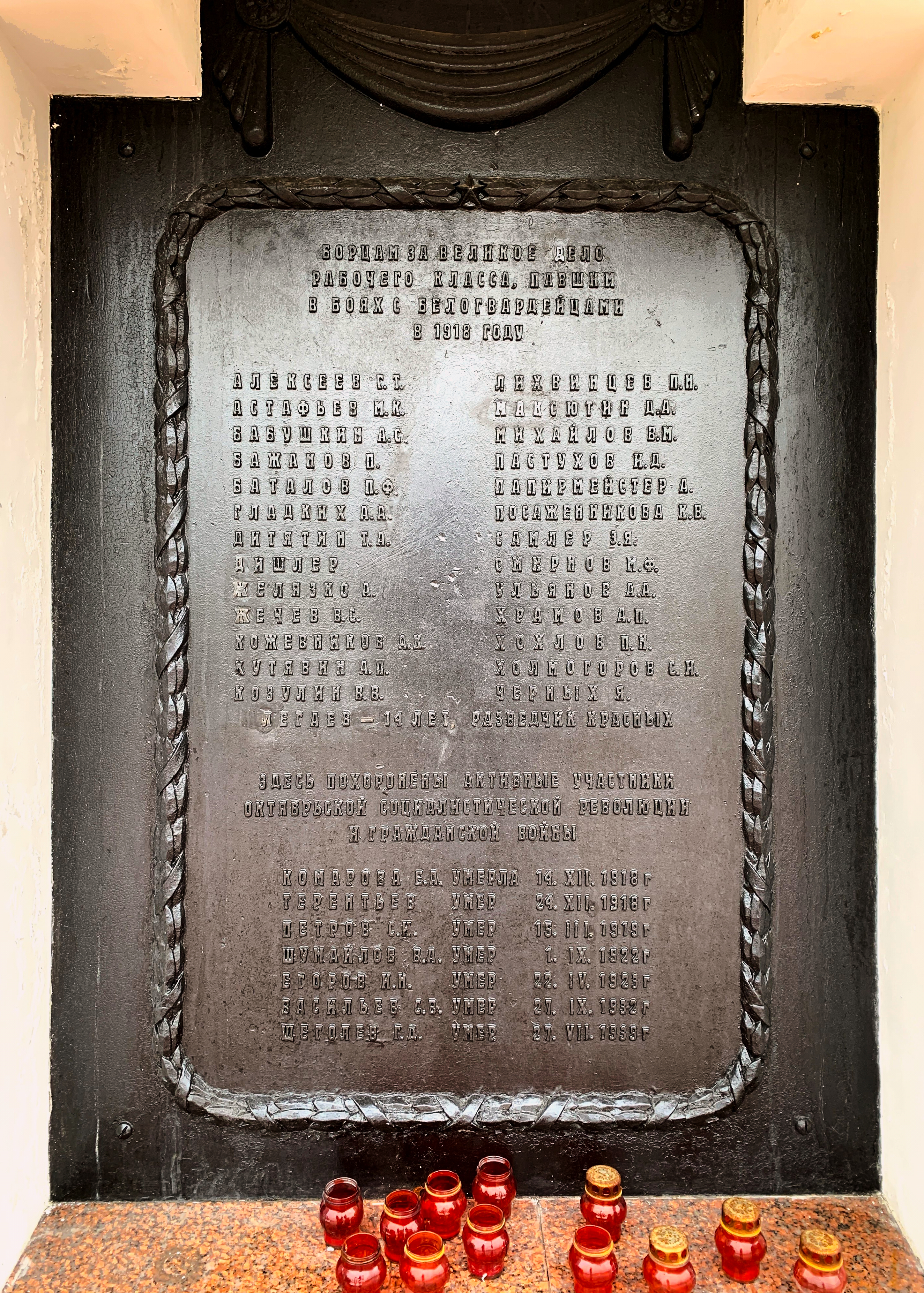 Братская могила борцов за советскую власть в Ижевске рядом со Свято-Михайловским собором. Памятная табличка в нише.